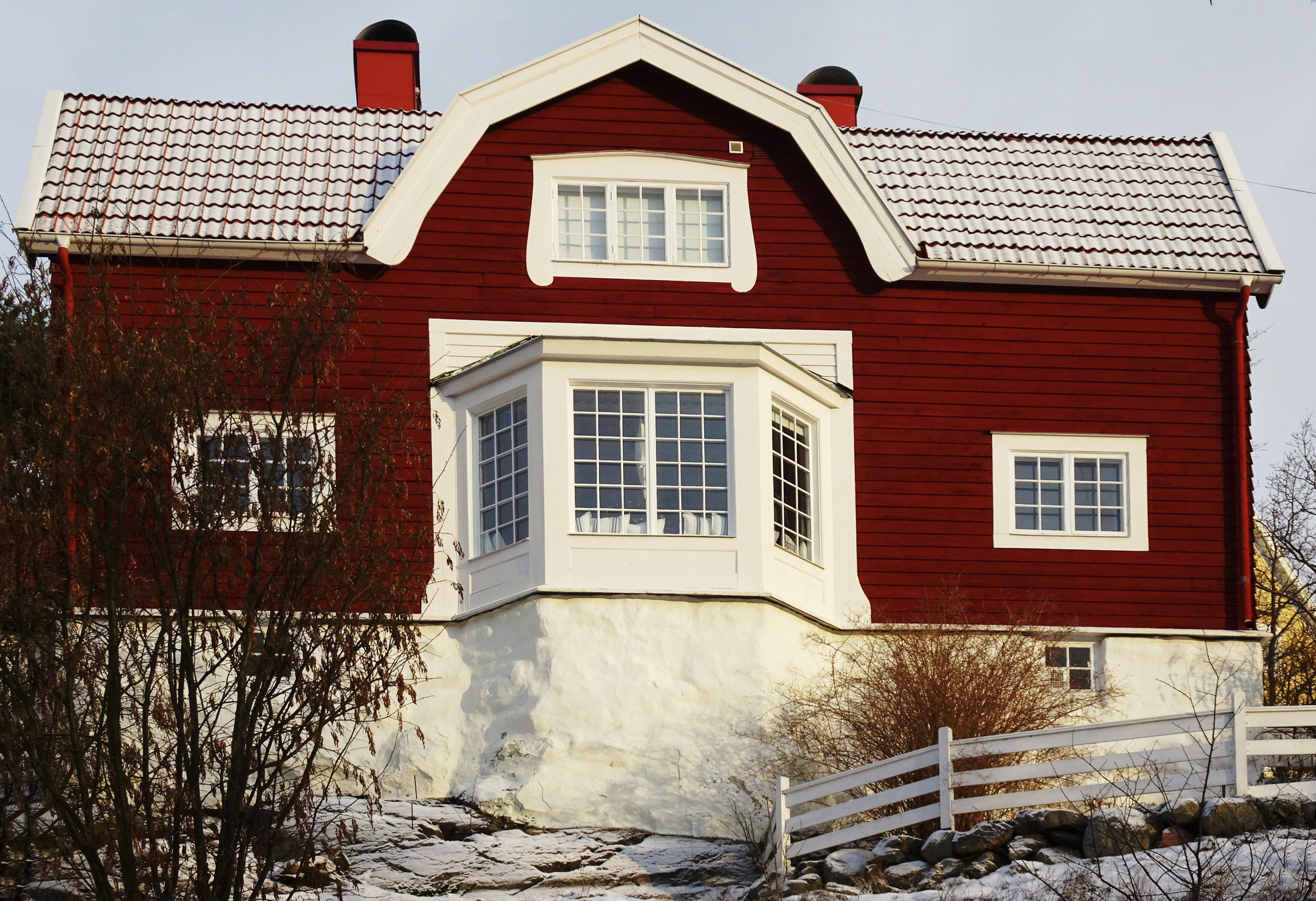 Tammska villan - fasader. Arkitekt Carl Westman. Byggherre Percy Tamm, byggd 1903, Ringvägen 37, Saltsjöbaden